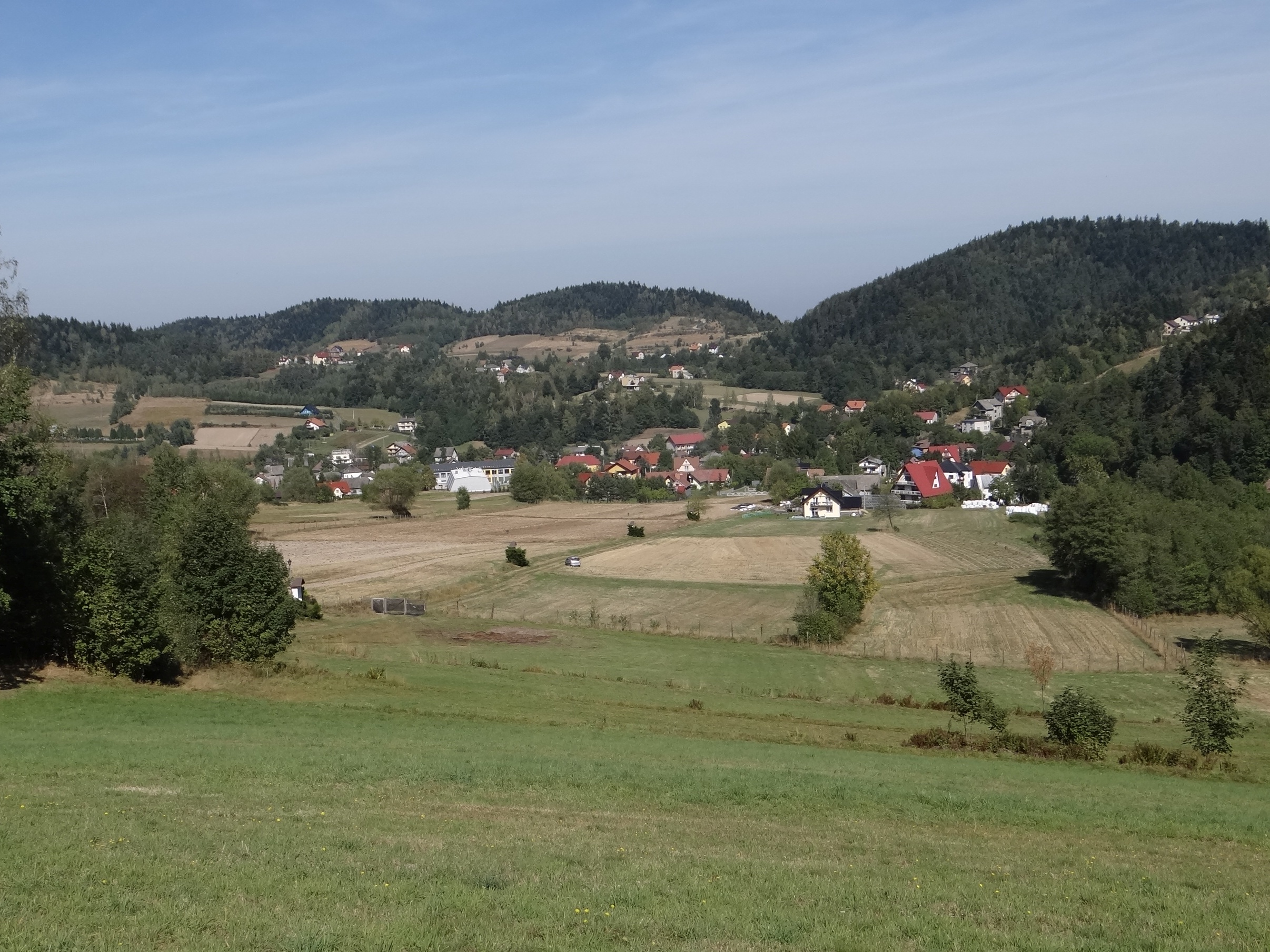 Zagórnik, widok ogólny